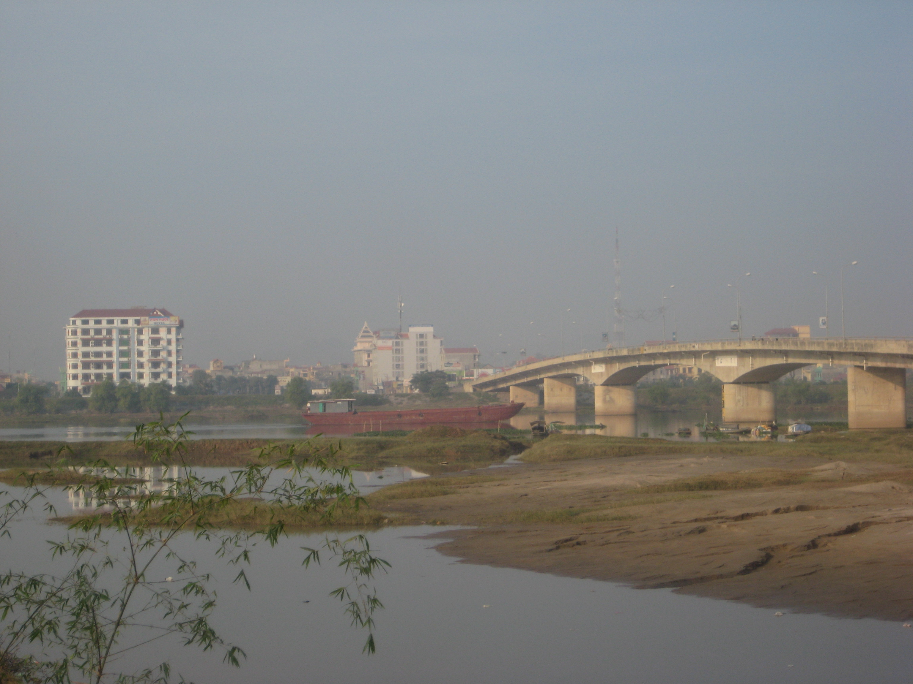 Cầu Non Nước ở Thành phố Ninh Bình